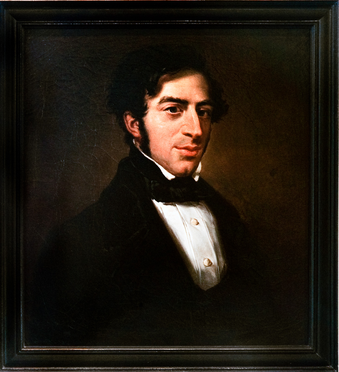 Schilderij De Castro, 721 Portret van David Henriques de Castro, door Gabriel Haim Henriques de Castro